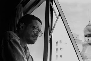 Mario Ortiz en Bahía Blanca. Por Betania Cappato